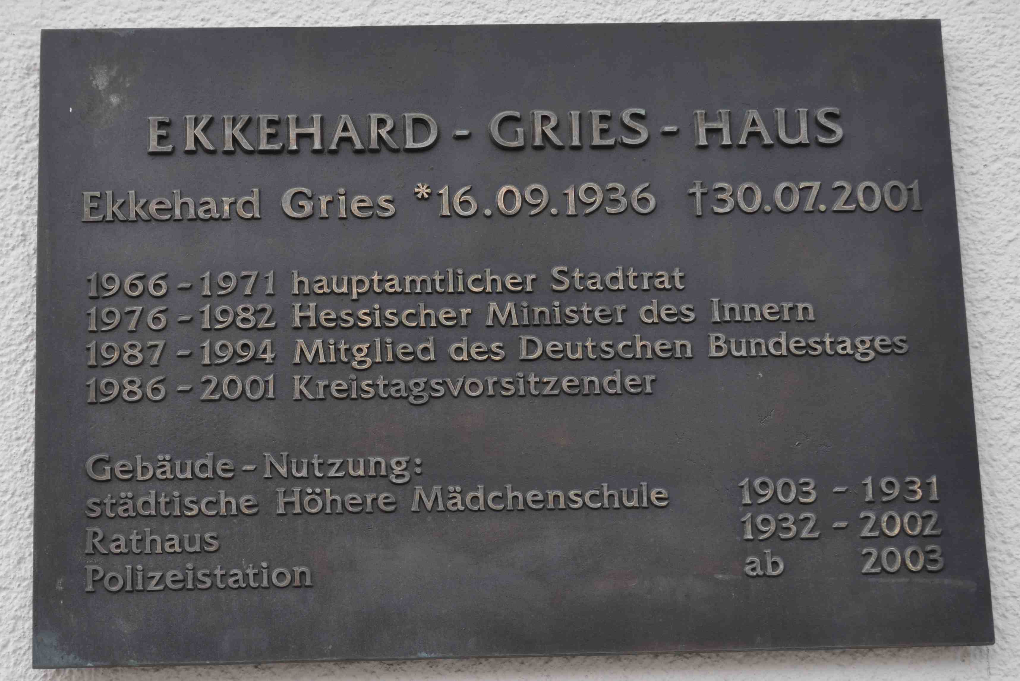 Tafel am Ekkehard Gries-Haus